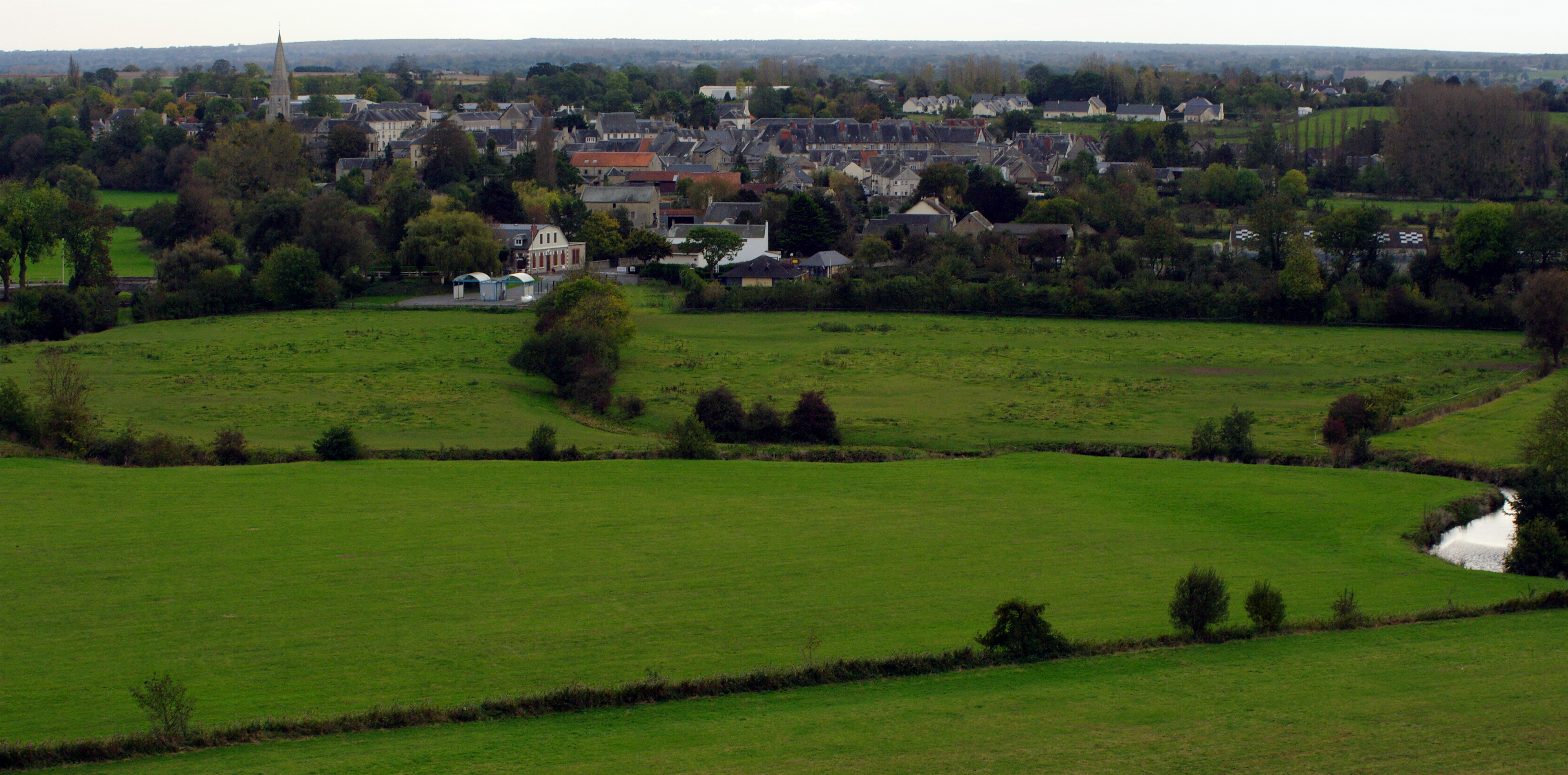 Une vue du bourg de Trévières et de la rivière Aure au premier plan.